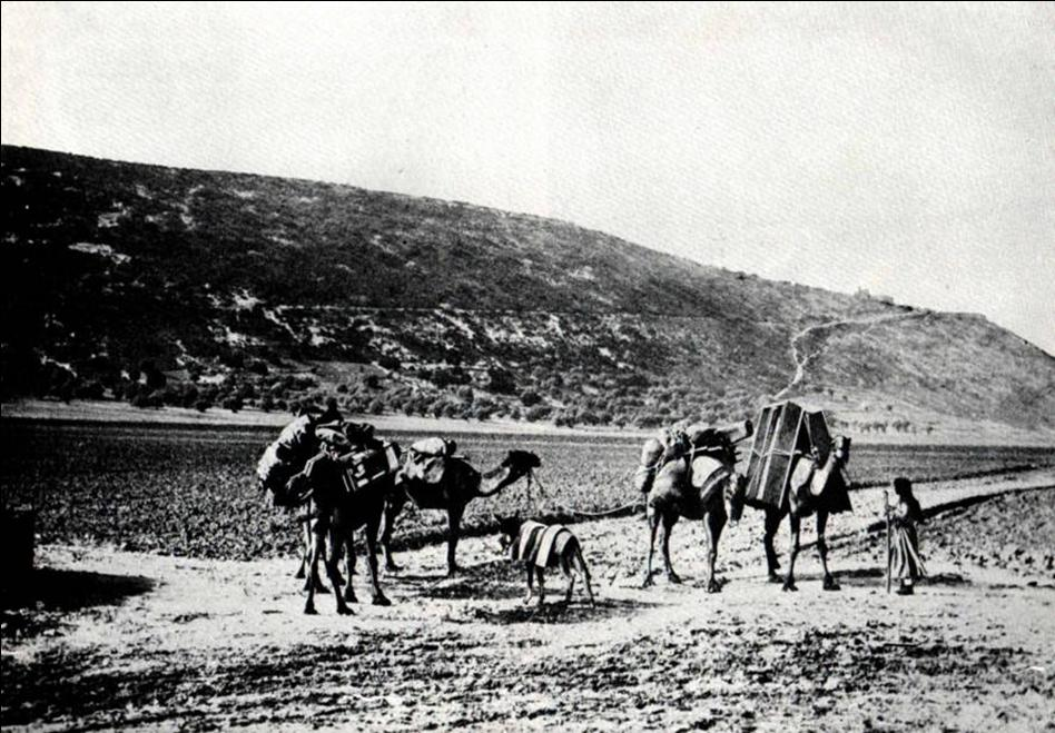 Historical images of Haifa תמונות היסטוריות של חיפה אורחת גמלים באזור בו הוקמה לאחר מכן שכונת קרית אליעזר של היום. הצילום משנת 1900